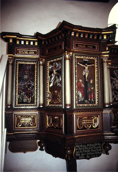 Bislev Kirke, Aalborg Kommune, prædikestol